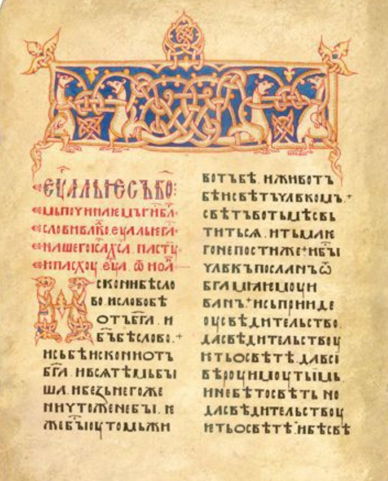 Сторінка з Луцького Євангелія